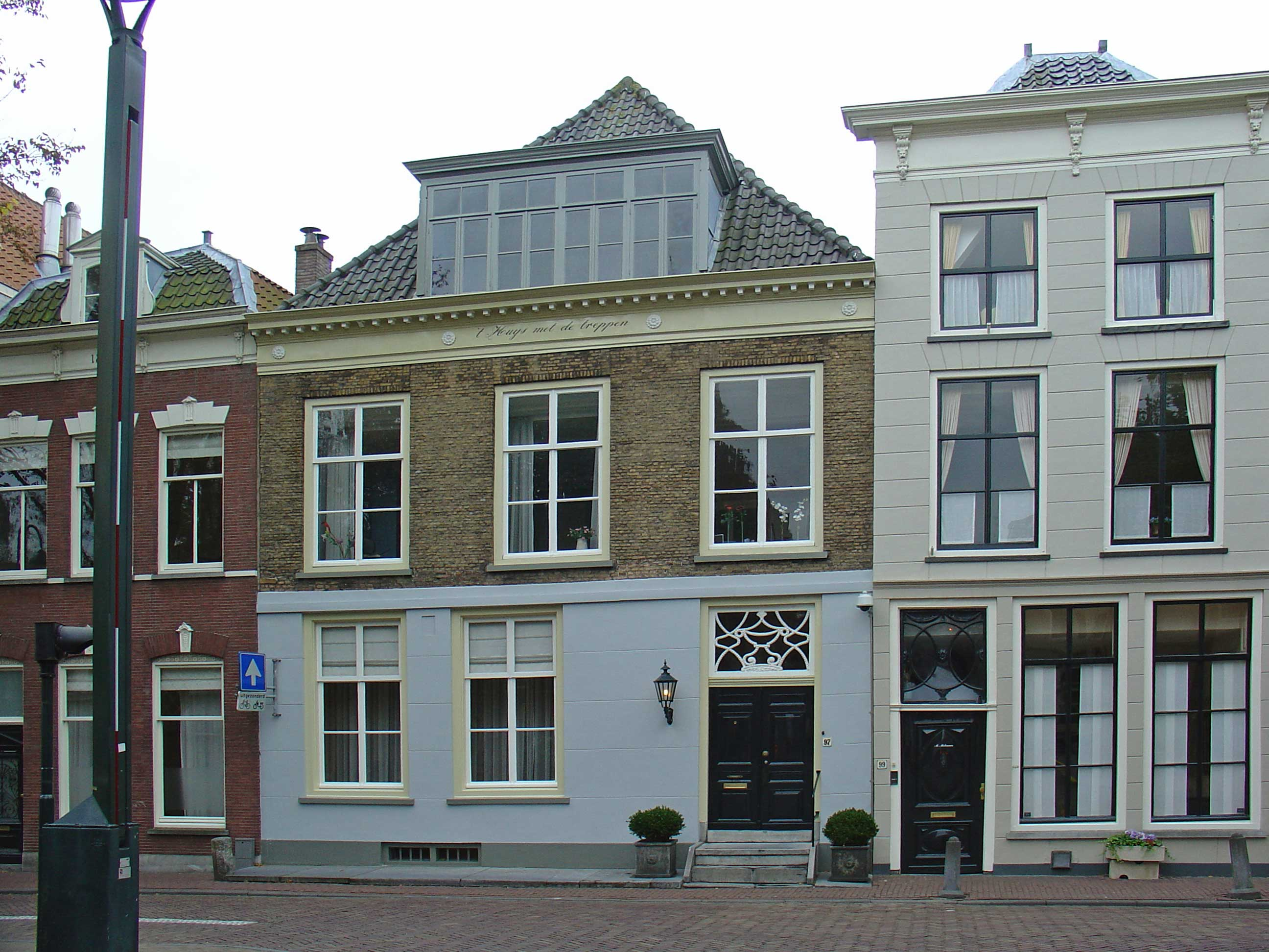 't Huys met de treppen, Gouwe 97 te Gouda. De twee panden aan de Gouwe waar Abraham Goedewaagen zijn bedrijf had, uiterst rechts het Dubbele Kruis (Gouwe 99) en daarnaast t Huys met de treppen (Gouwe 97)